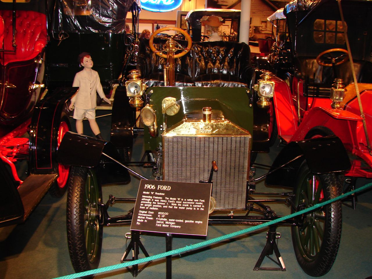 1906-ൽ നിര്മ്മിക്കപ്പെട്ട ഫോർഡ് മോഡൽ -എൻ റോഡ്‌സ്റ്റർ. ലൂറേ കാവേണ്സിനടുത്തുള്ള ഓട്ടോമൊബൈൽ മ്യൂസിയത്തില് നിന്നും